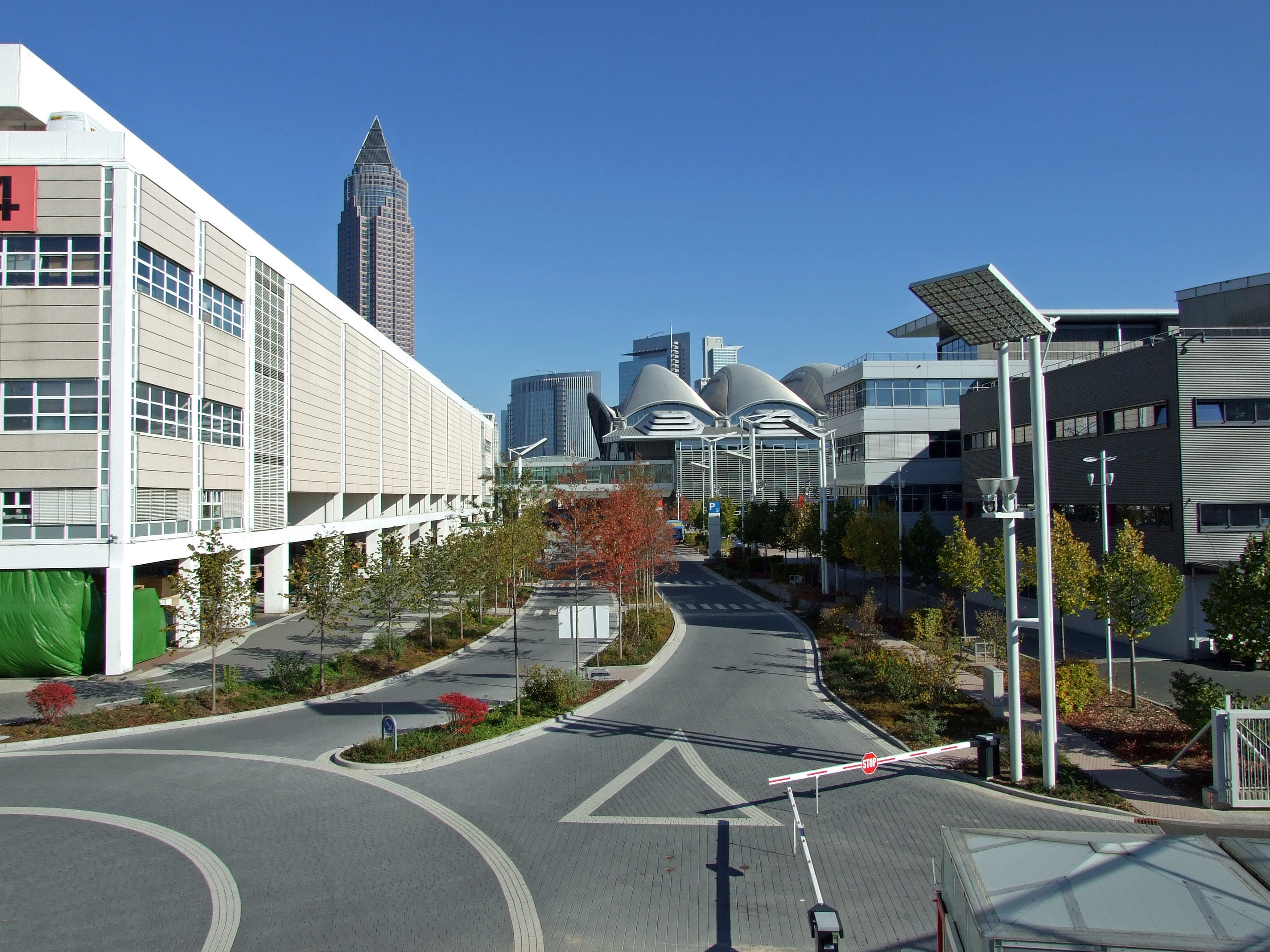 Messegelände in Ffm von Emser-Brücke (West) gesehen